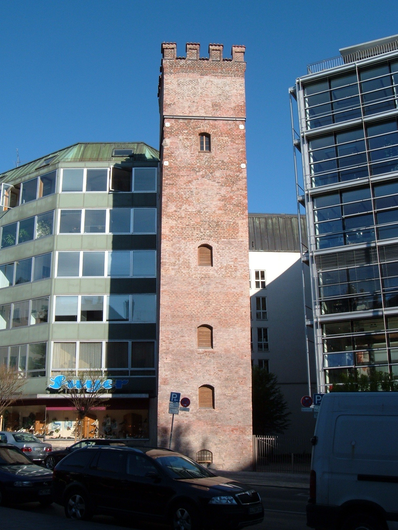 Löwenturm, München